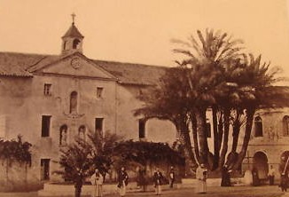 Monastère de la Trappe Notre-Dame de Staouëli, Albumine. d'après une carte postale/